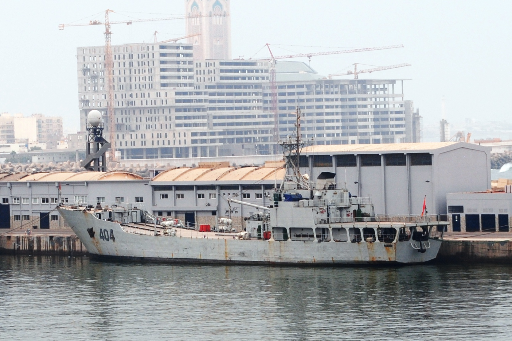 404 Abou Abdallah El Ayachi